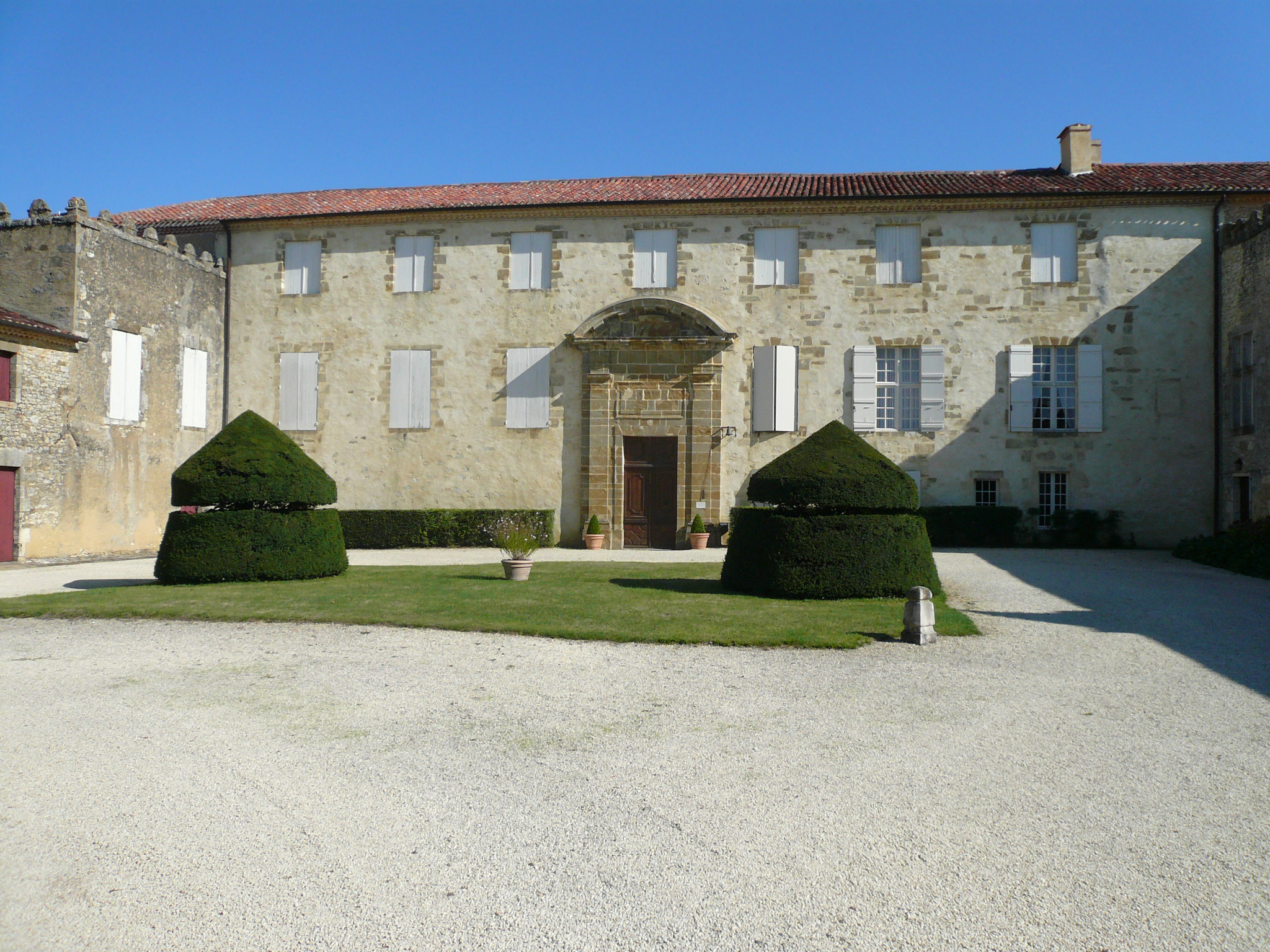 Château du Busca-Maniban